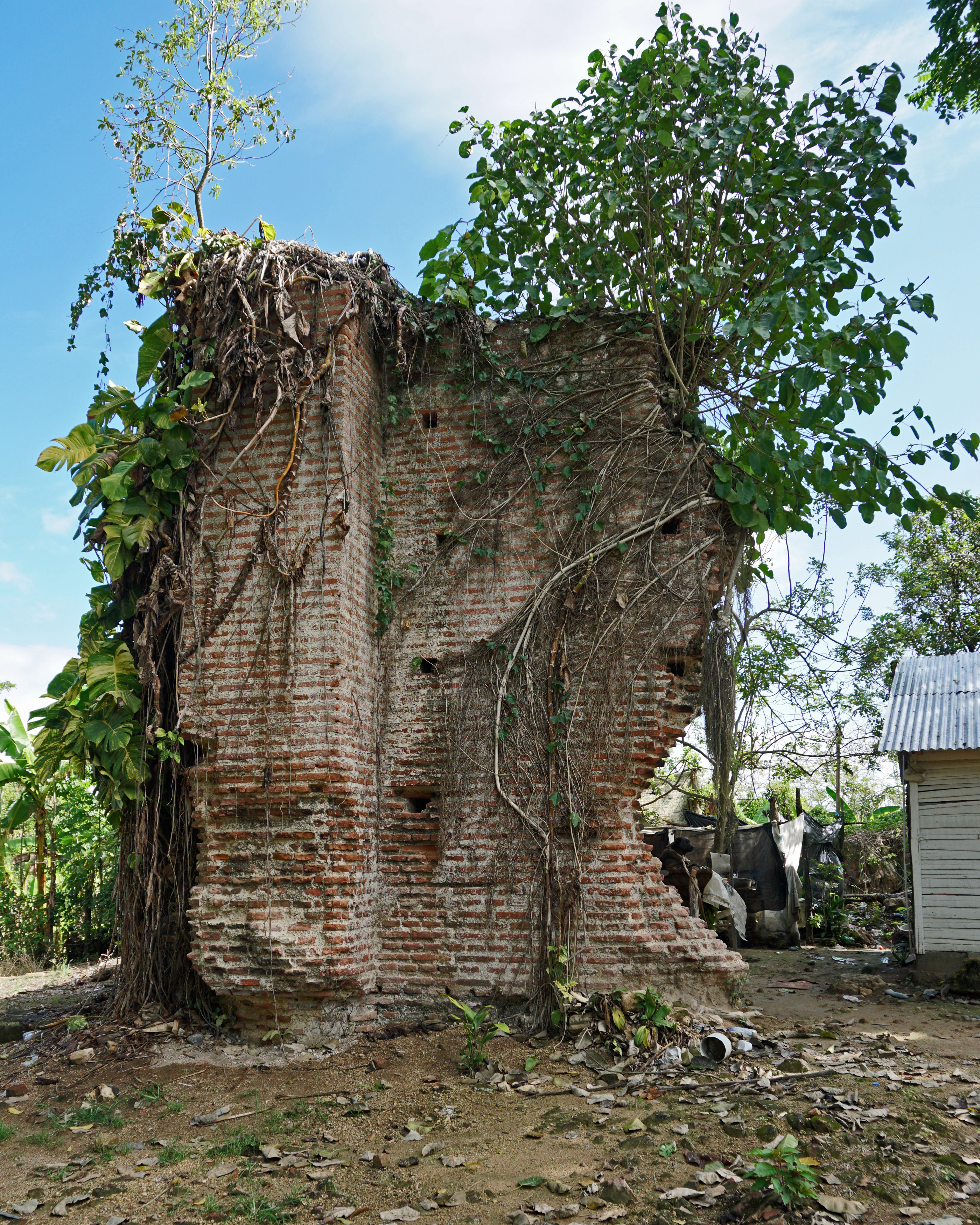 Ruinas de una pared exterior y contrafuerte de la catedral de la Concepción de la Vega (La Vega Vieja). Esta es el único resto de las ruinas de la catedral todavía en pie.